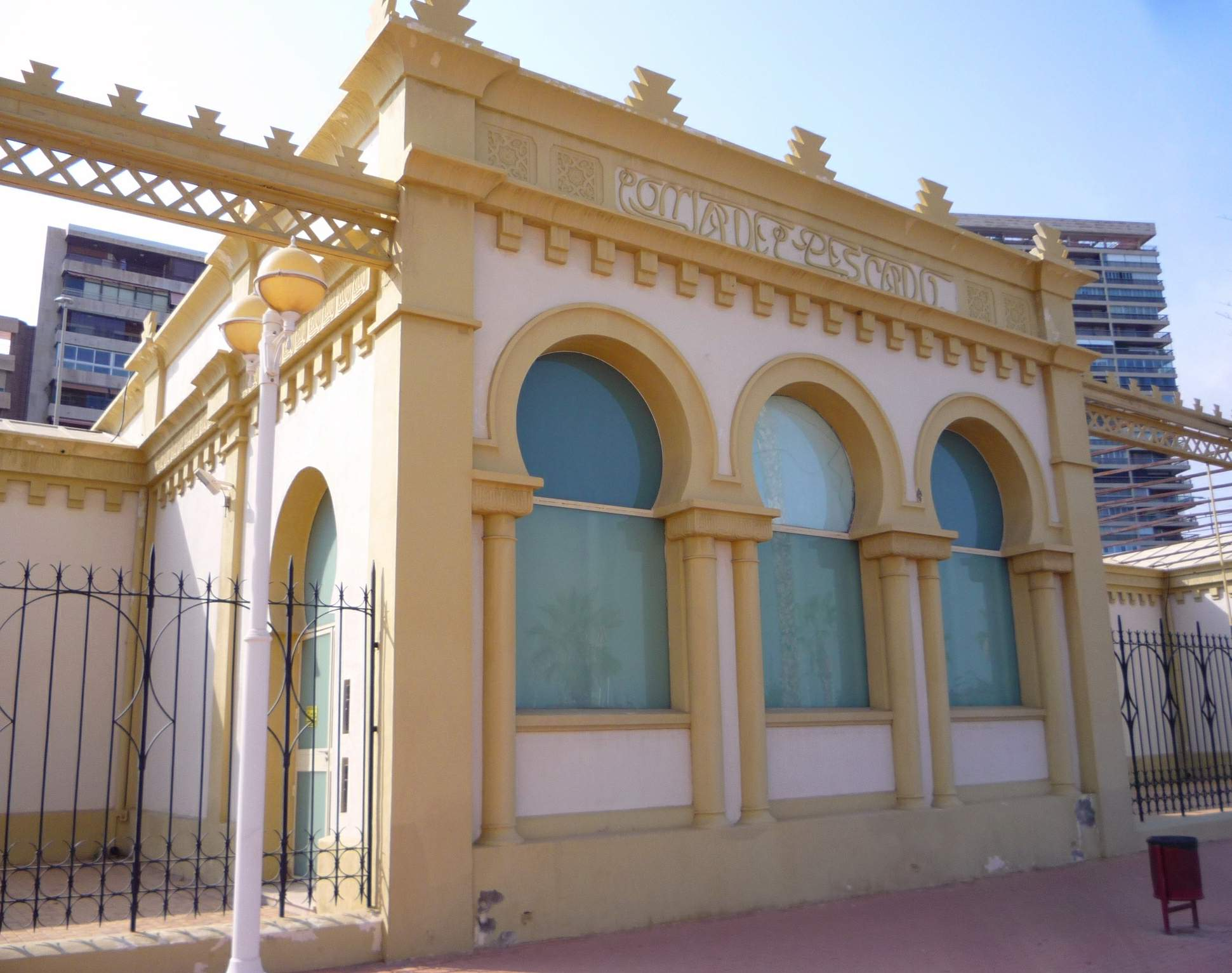 Alicante - Sala Municipal de Exposiciones 'Lonja del Pescado'